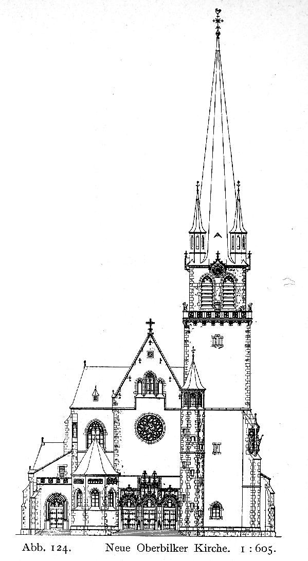 St. Apollinariskirche in Düsseldorf-Oberbilk, erbaut 1904/1907, Architekt Caspar Clemens Pickel, Aufriss ("Neue Oberbilker Kirche").jpg